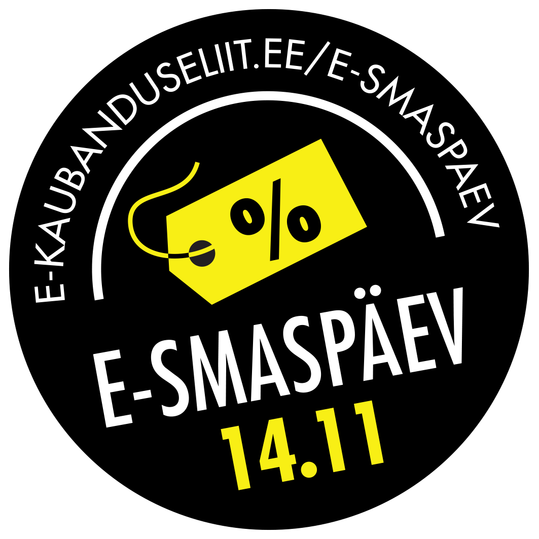 E-smaspäeva logo, mis muutub iga aasta vastavalt kuupäevale.